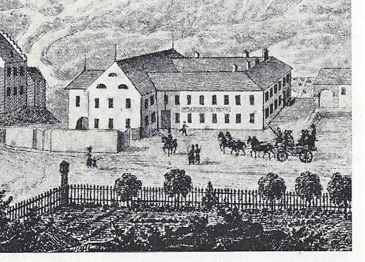 Der Rheinhof in Waldshut in den 1840er Jahren nach Godefroy Engelmann.